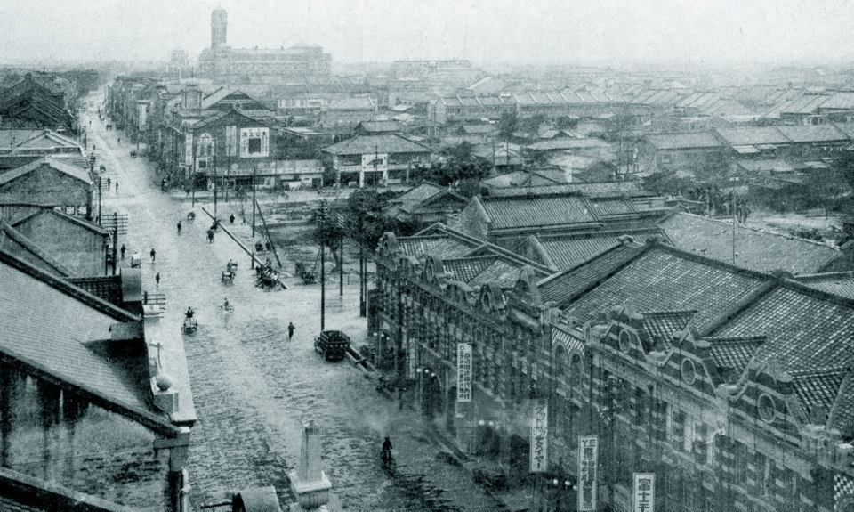 自臺北榮町附近遠望總督府建築。